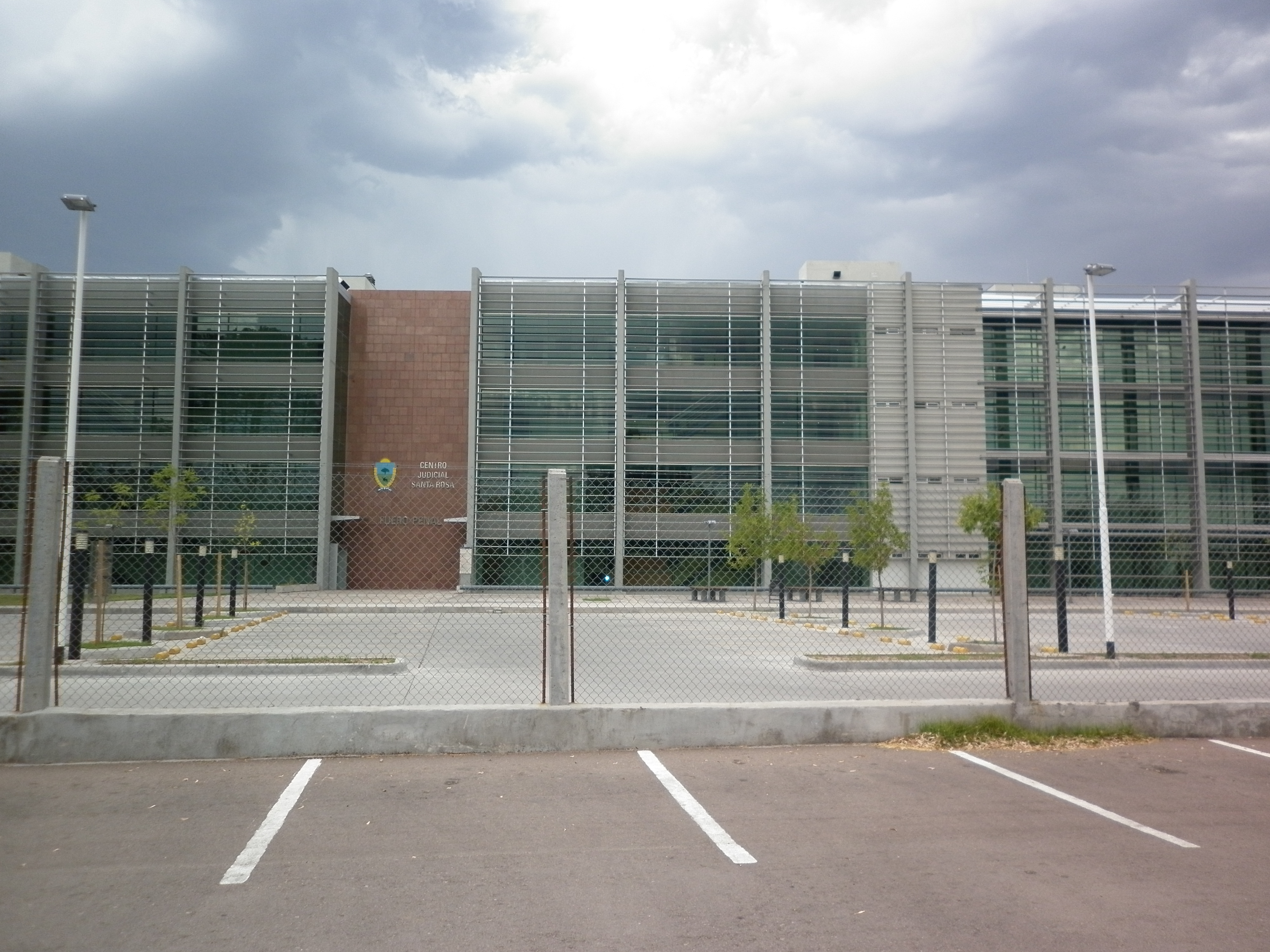 En la fotografía, se halla el edificio de una de las jurisdicciones de la justicia de la Provincia de La Pampa.